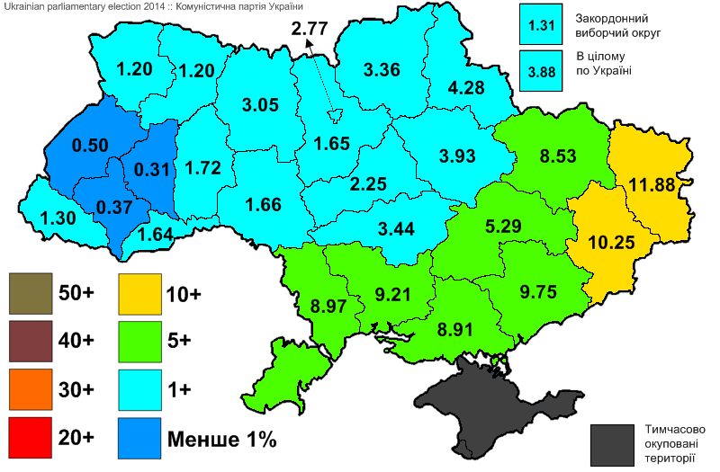 Результати виборів до Верховної Ради України, які відбулись 25 жовтня 2014 року. Інформація з офіційного сайту ЦВК. Комуністична партія України.